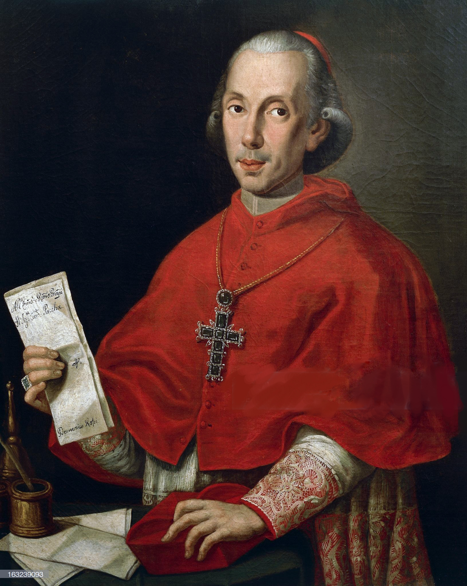 Portrait of Bartolomeo Pacca (Benevento, 1756-Rome, 1844), Italian cardinal and Cardinal Secretary of State with Pope Pius VII